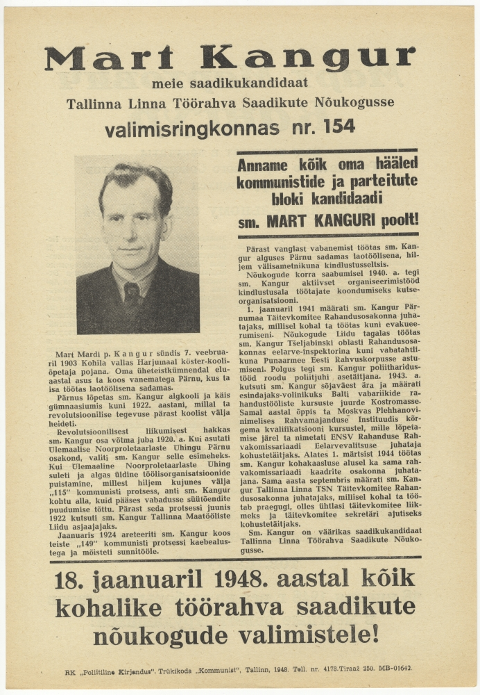 Valimisreklaam: Tallinna Linna TSN 1948. a valimiste saadikukandidaat Mart Kangur